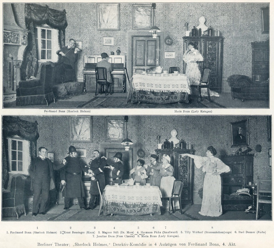 Zwei Szenenbilder aus der Detektiv-Komödie "Sherlock Holmes" von Ferdinand Bonn.